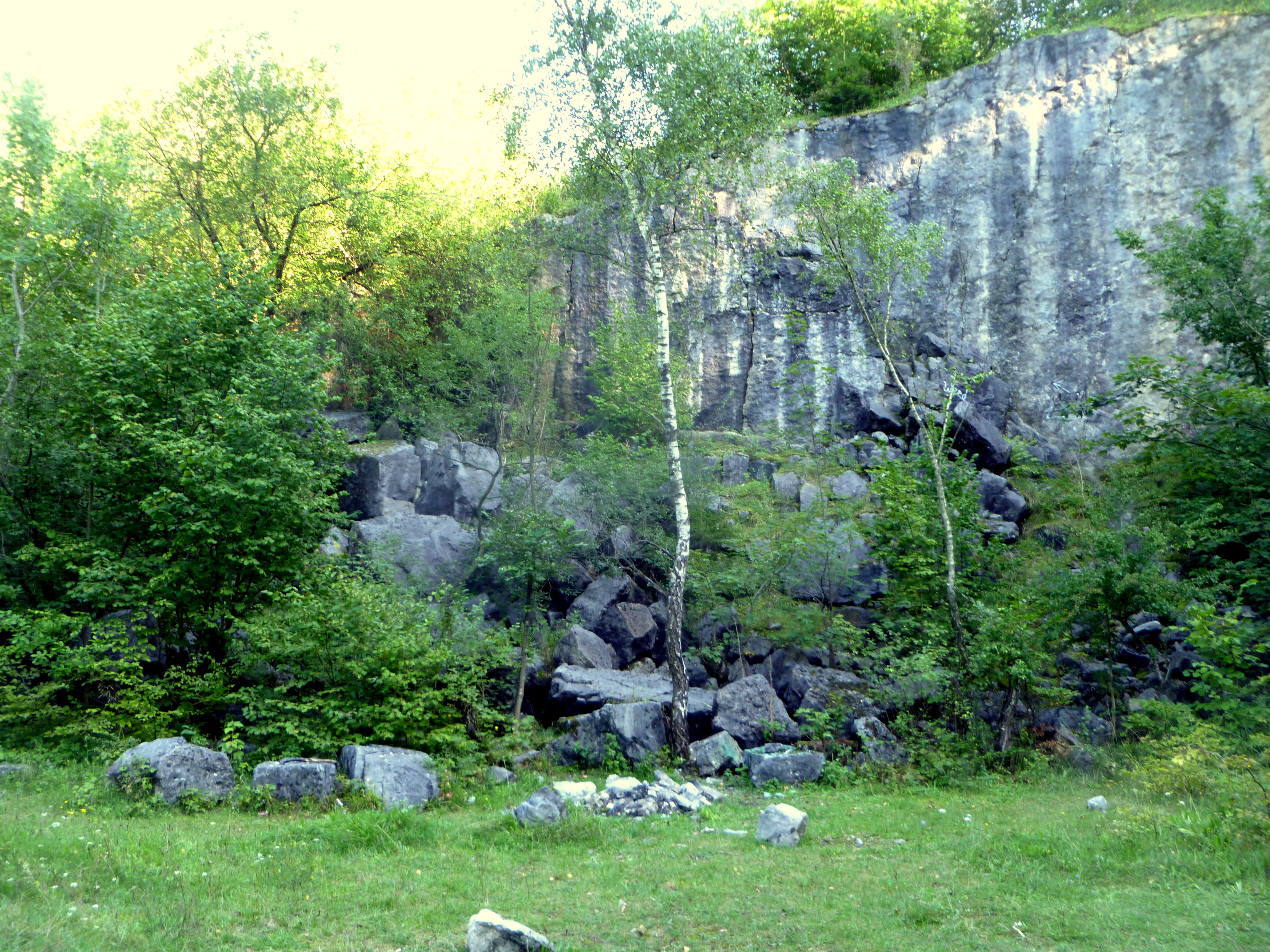 ehemaliger Steinbruch in Aachen-Walheim